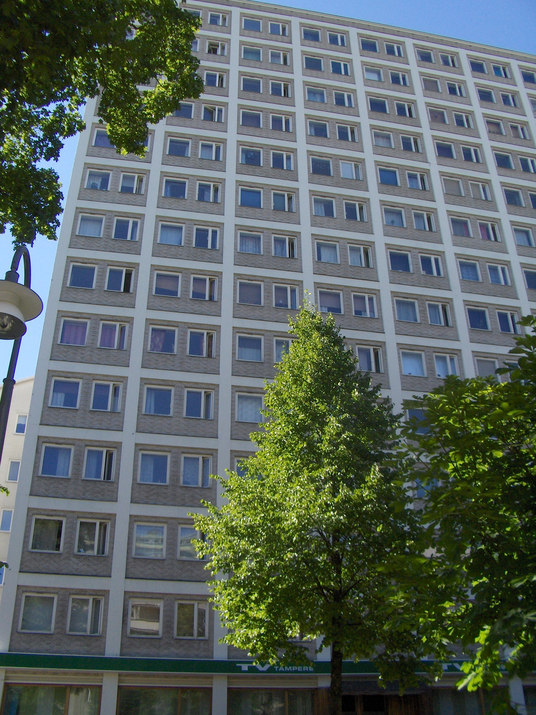 Impilinna building in Tampere